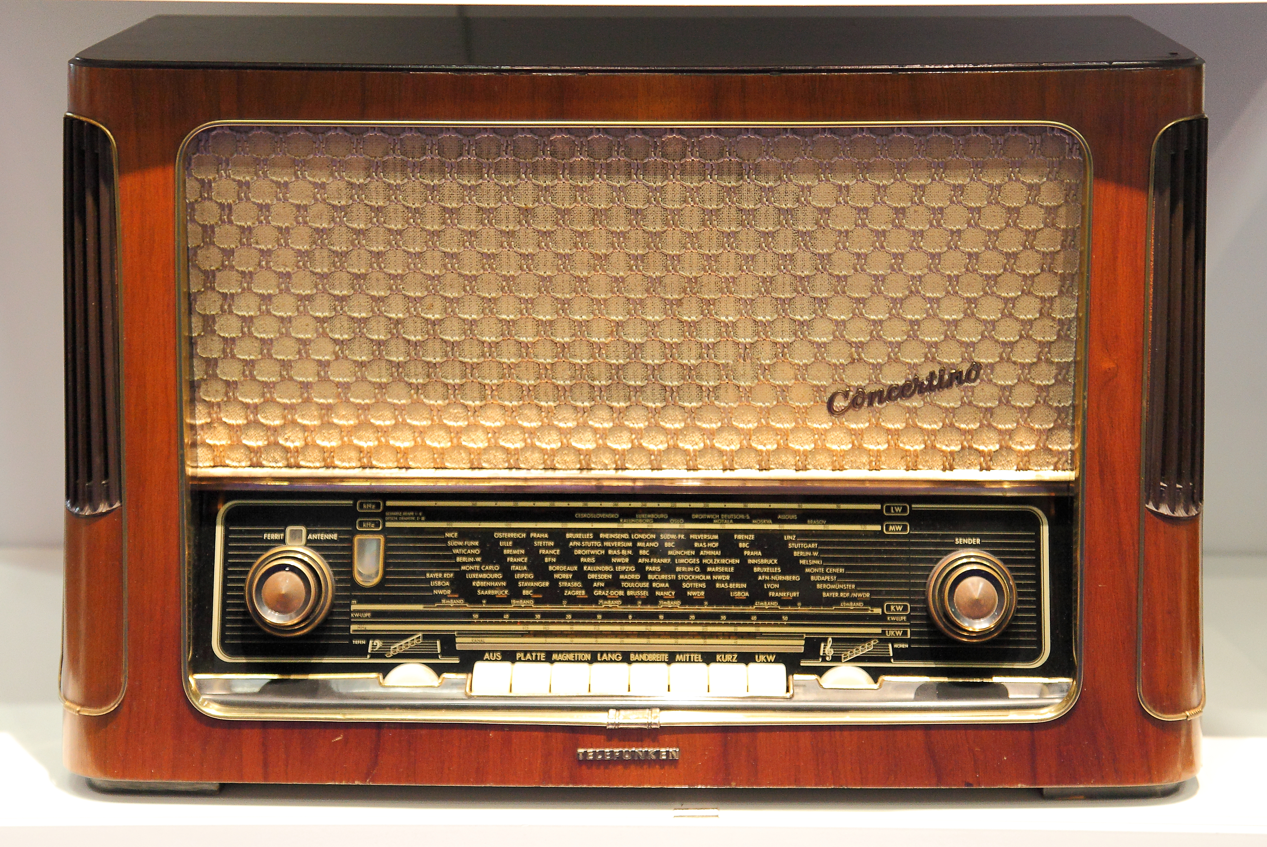 Deutsches Rundfunk-Museum, Ausstellung auf der Internationalen Funkausstellung 2012 in Berlin